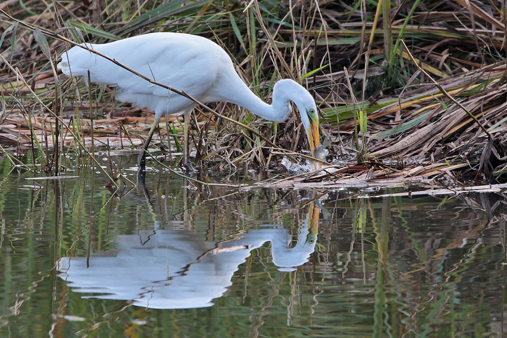 Silberreiher im Ilkerbruch